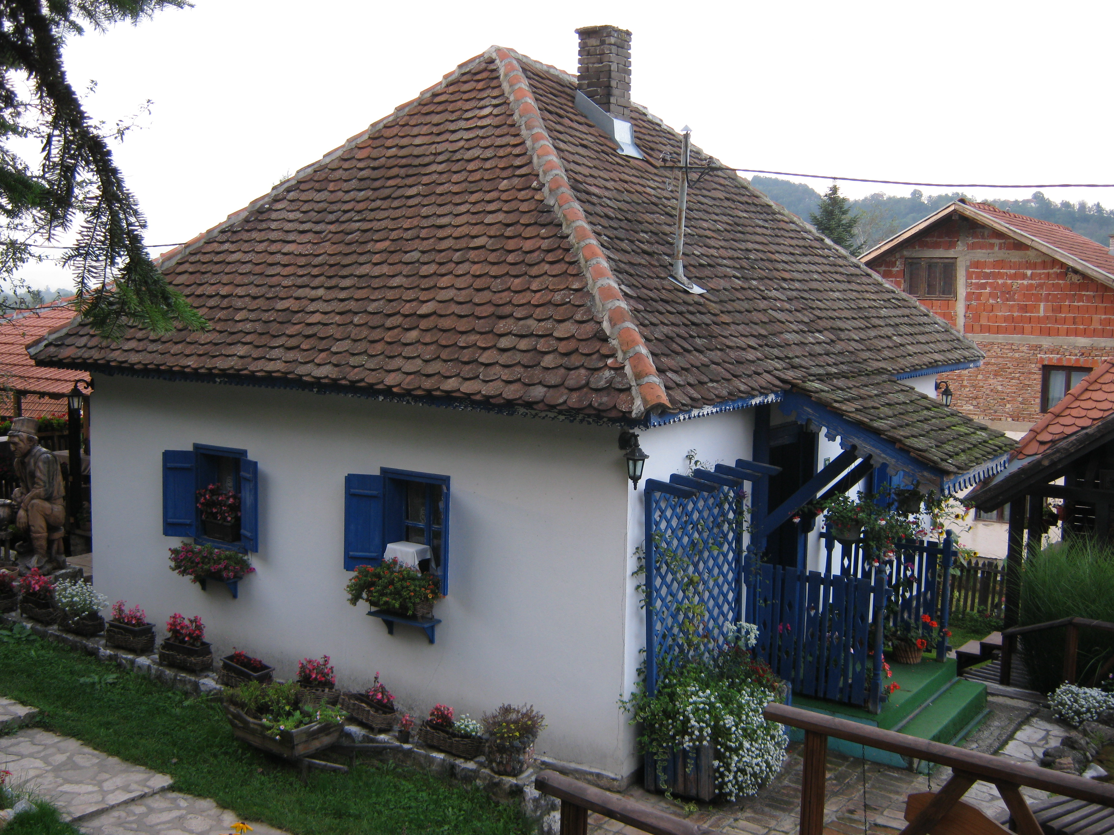 Етно парк Терзића авлија, као сеоско туристичко домаћинство, из околине Ужица, у селу Злакуса (185 km од Београда) представља једну врсту музеја на отвореном и затвореном. У близини се налази Потпећка пећина тако да је савршено место за излет и увид у прелепу историју села, културе и природних лепота Србије.